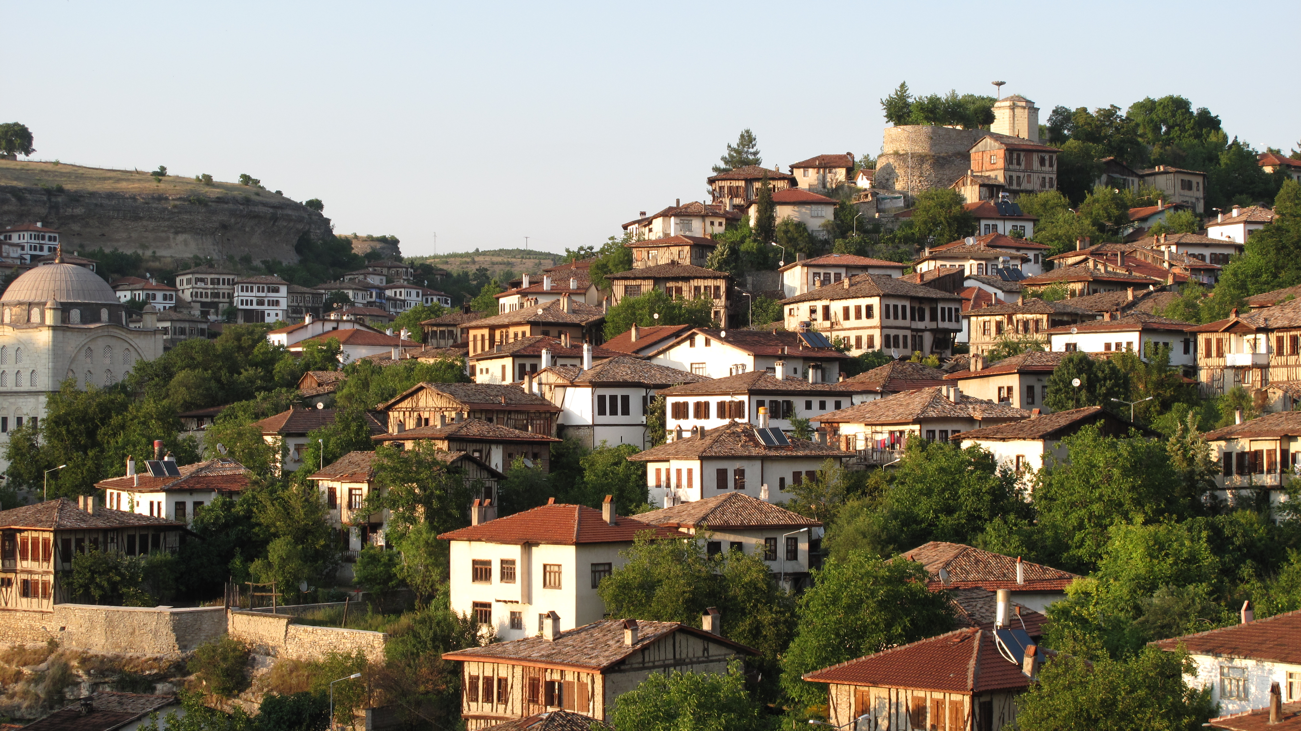 番紅花城整體山景